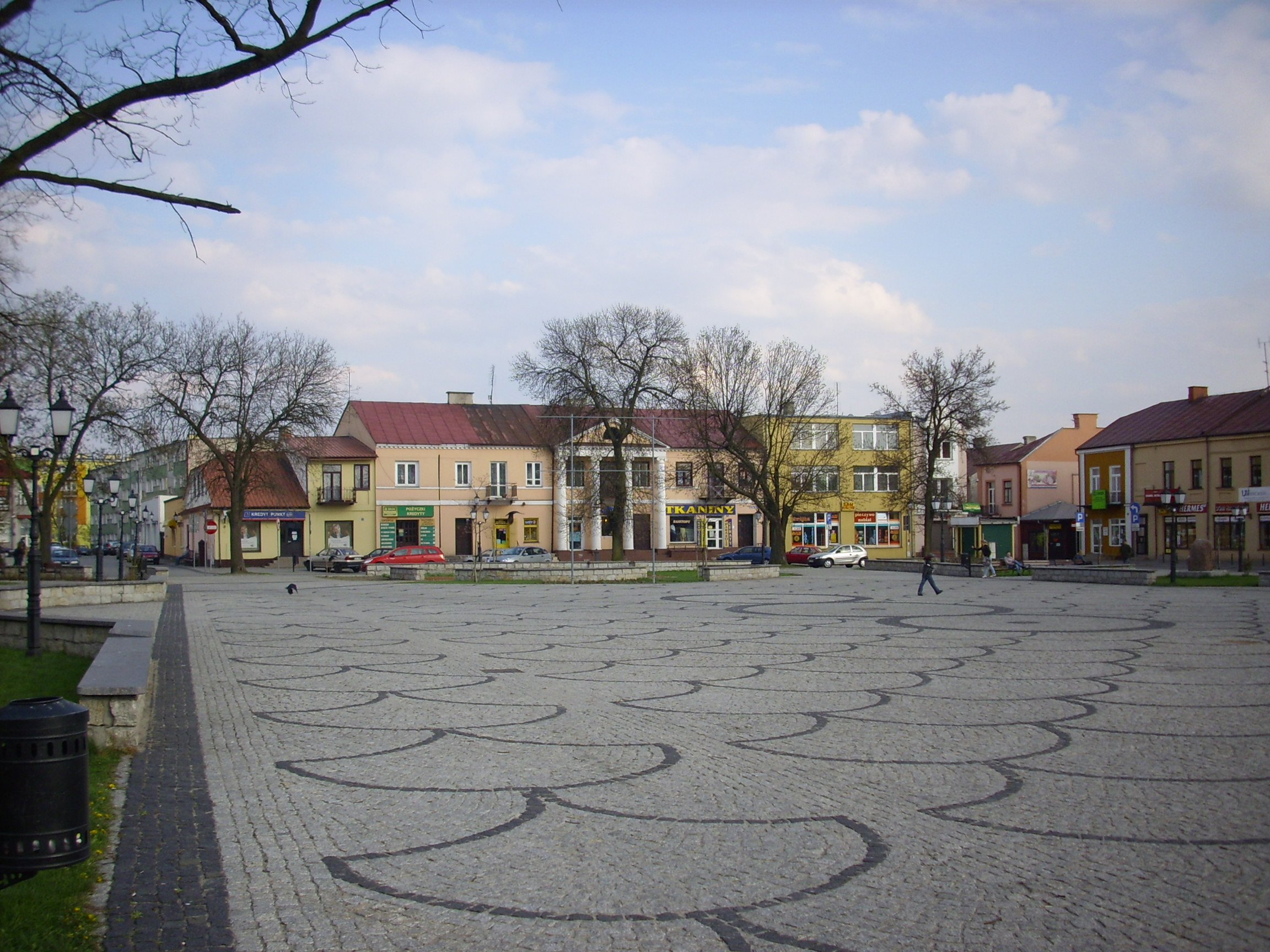 Rynek w Międzyrzecu Podlaskim. W głębi pałac Czartoryskich.